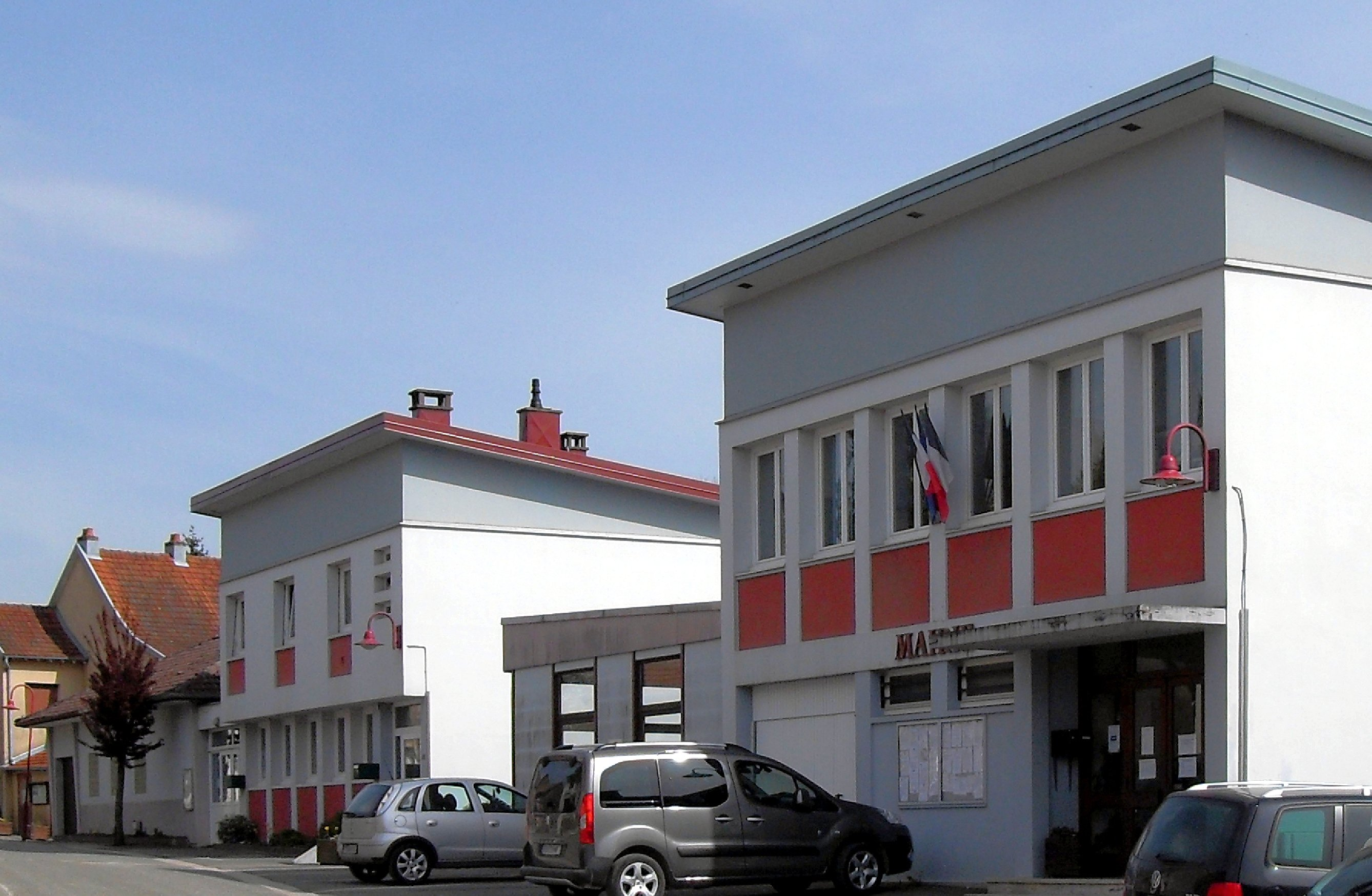 La mairie de Dambenois